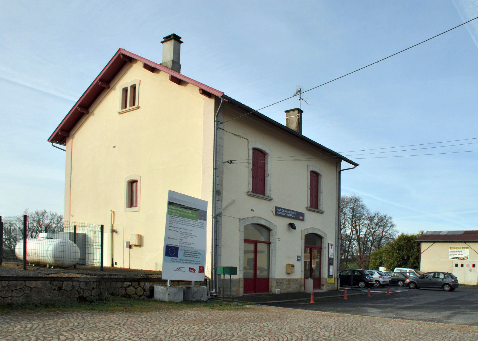 Gare de Baraqueville - Carcenac-Peyralès